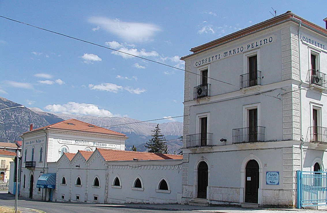 Museo dell'arte e della tecnologia confettiera